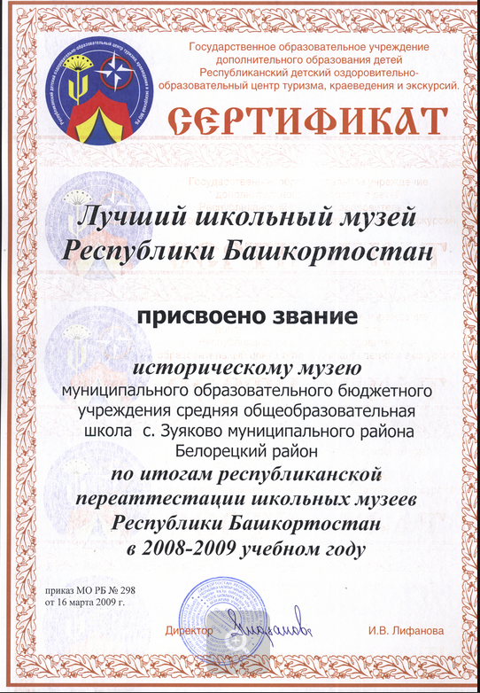 «Башҡортостан Республикаһының иң яҡшы мәктәп музейы» сертификаты